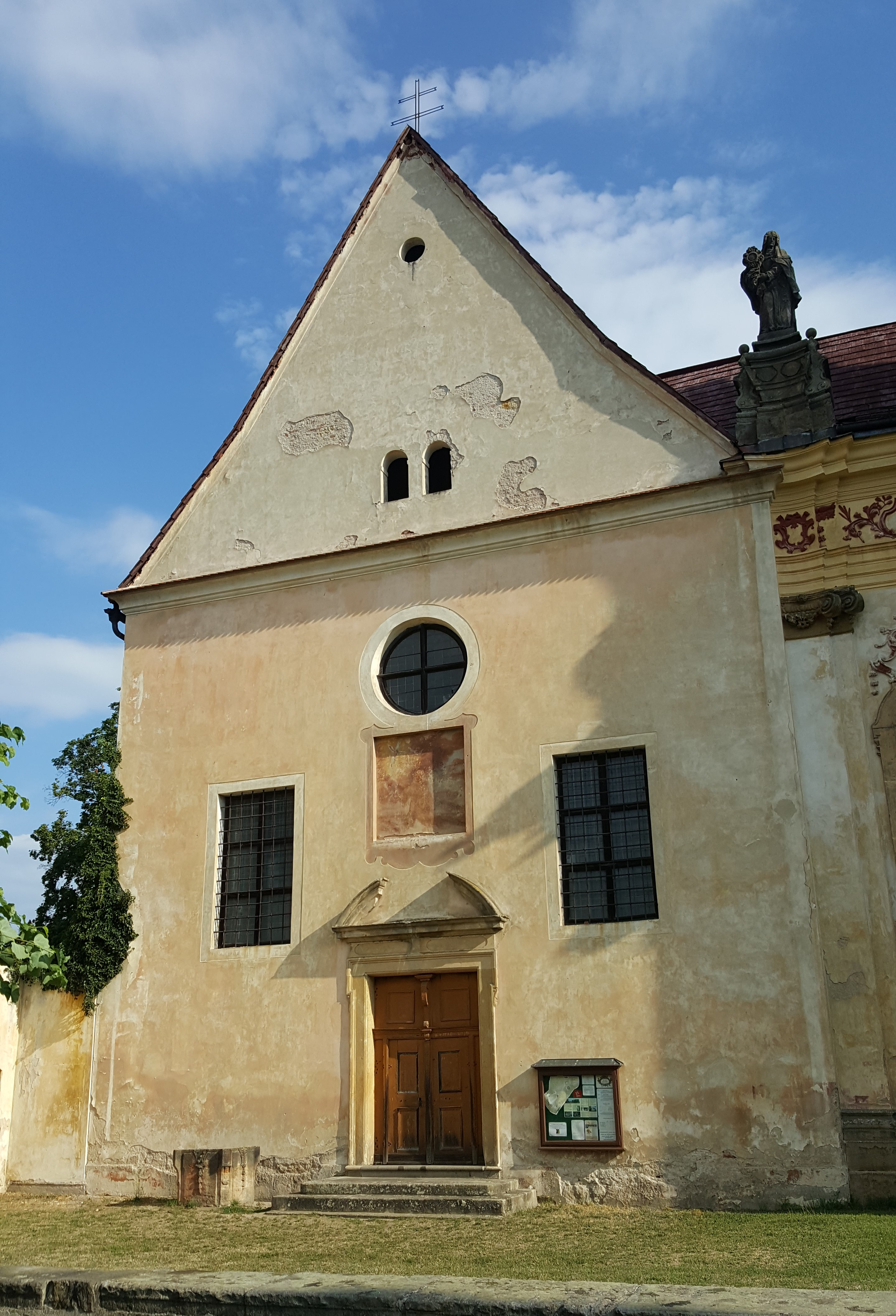 Bývalý kapucínský kostel svatých Tří králů, Mnichovo Hradiště